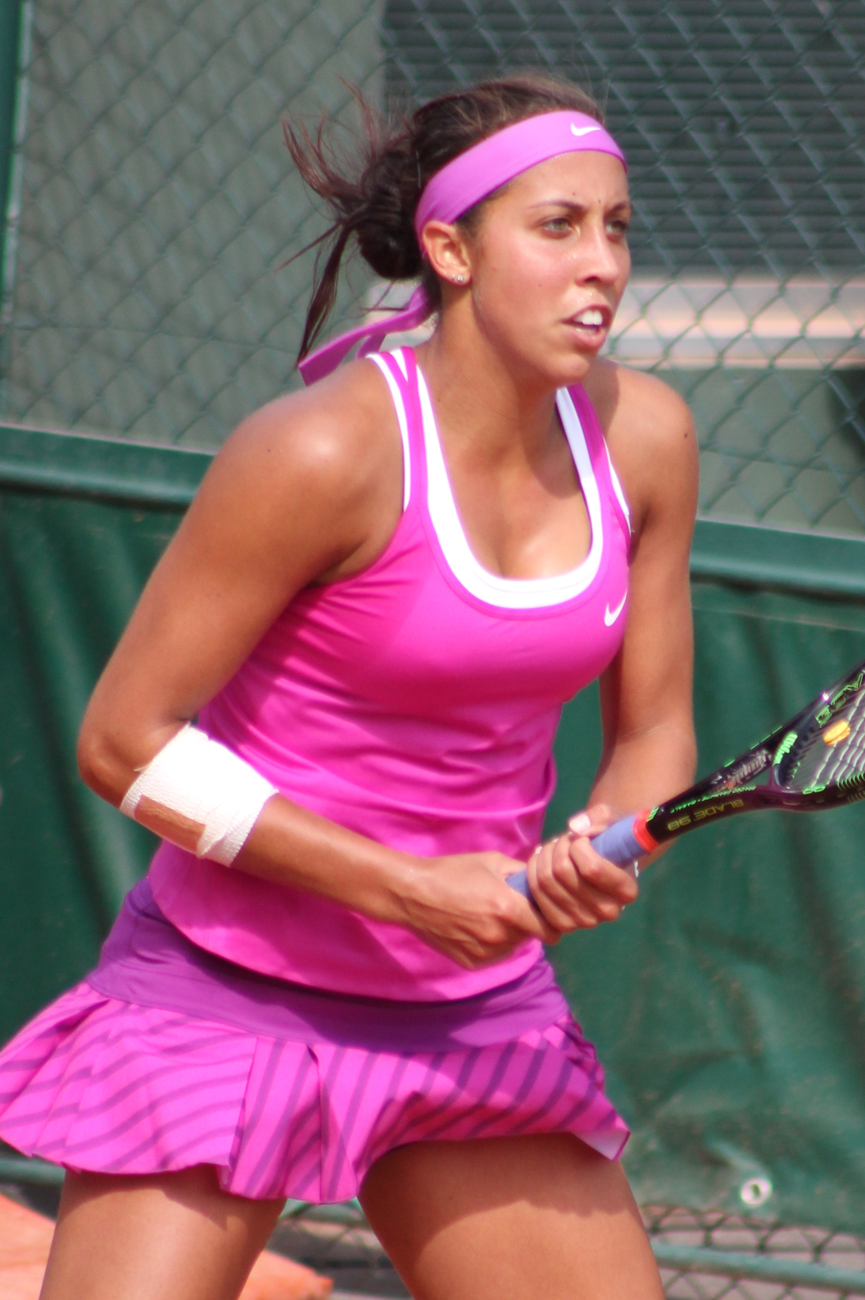 Keys RG15 (7)